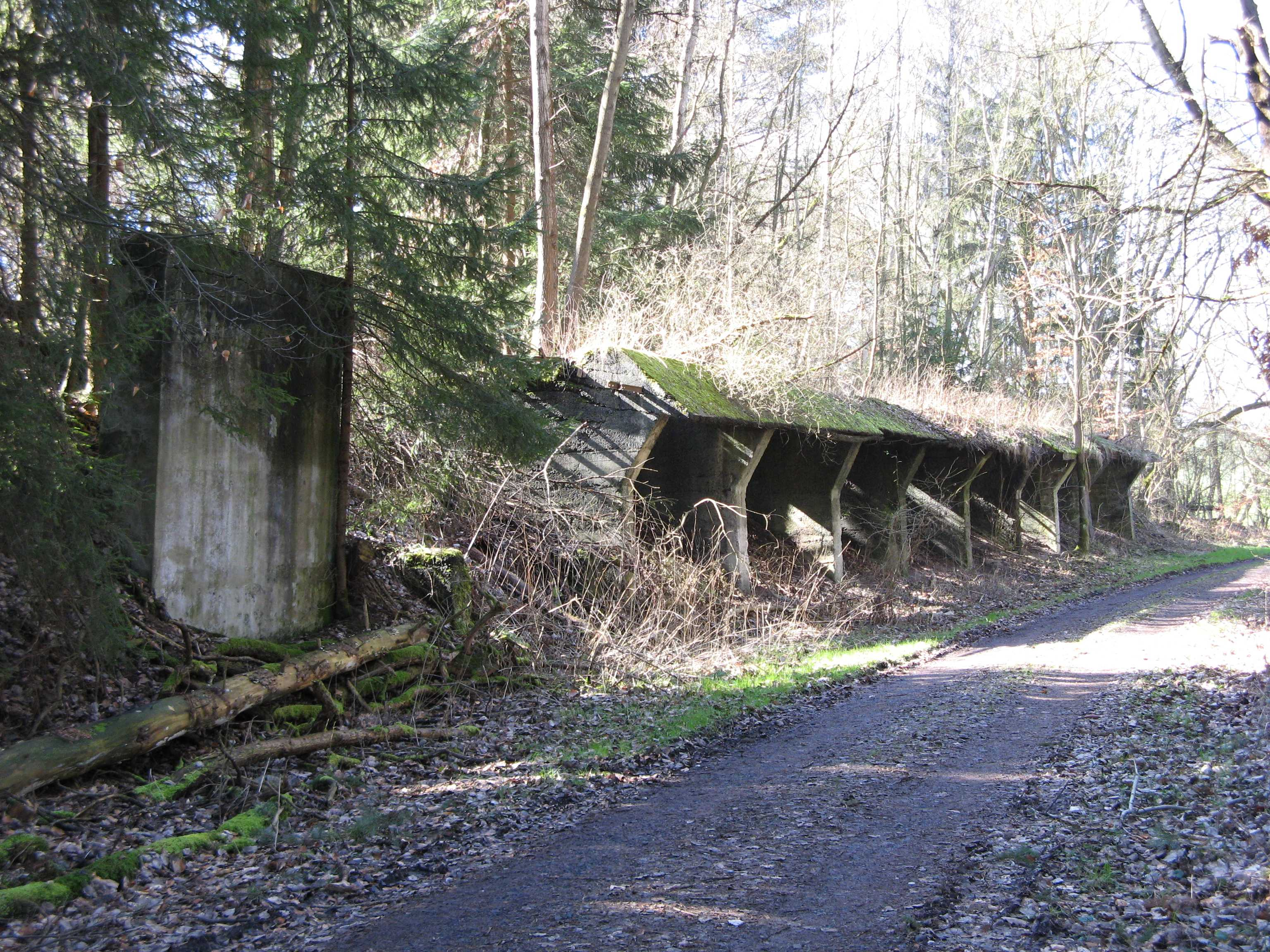 Reste der Laderampe der Kerkerbachbahn an einer Hintermeilinger Tongrube